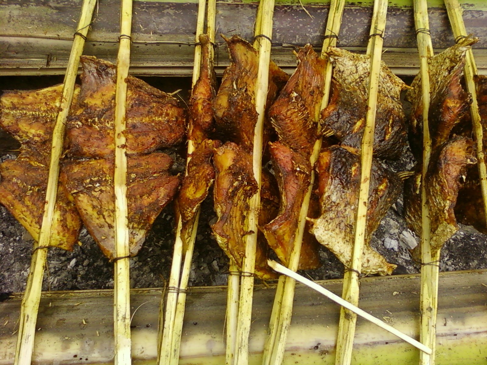 Cá nướng thái xuyên 7